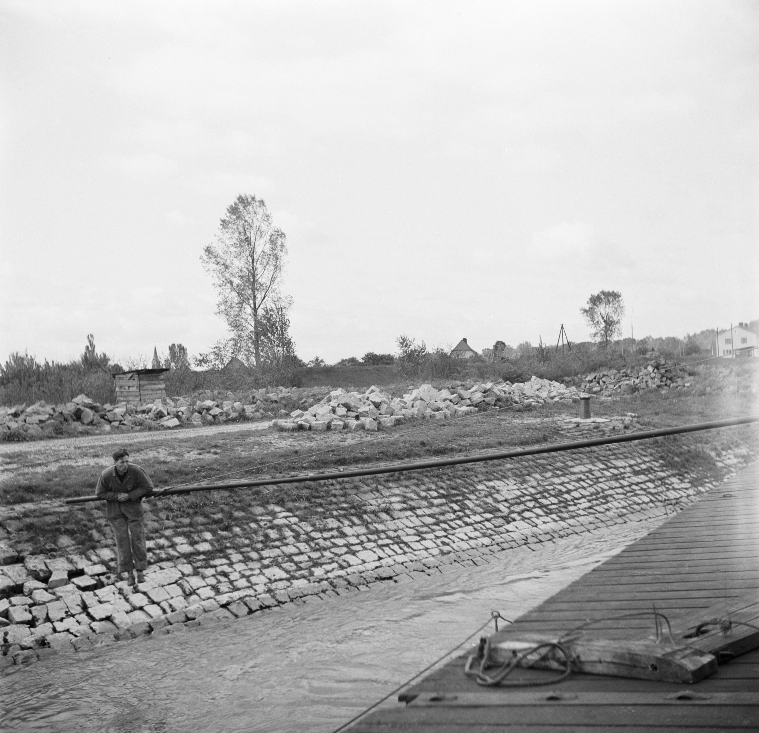 Collectie / Archief : Fotocollectie Van de Poll Reportage / Serie : Rijnvaart, reportage over het leven en werken aan boord van een Rijnschip Beschrijving : Bemanningslid hangend aan de zwaaiboom van de Damco 230 Datum : 1 april 1955 Locatie : Duitsland, West-Duitsland Trefwoorden : binnenvaartschepen, rivieren, schippers Fotograaf : Poll, Willem van de Auteursrechthebbende : Nationaal Archief Materiaalsoort : Negatief (6x6) Nummer archiefinventaris : bekijk toegang 2.24.14.02 Bestanddeelnummer : 254-1596